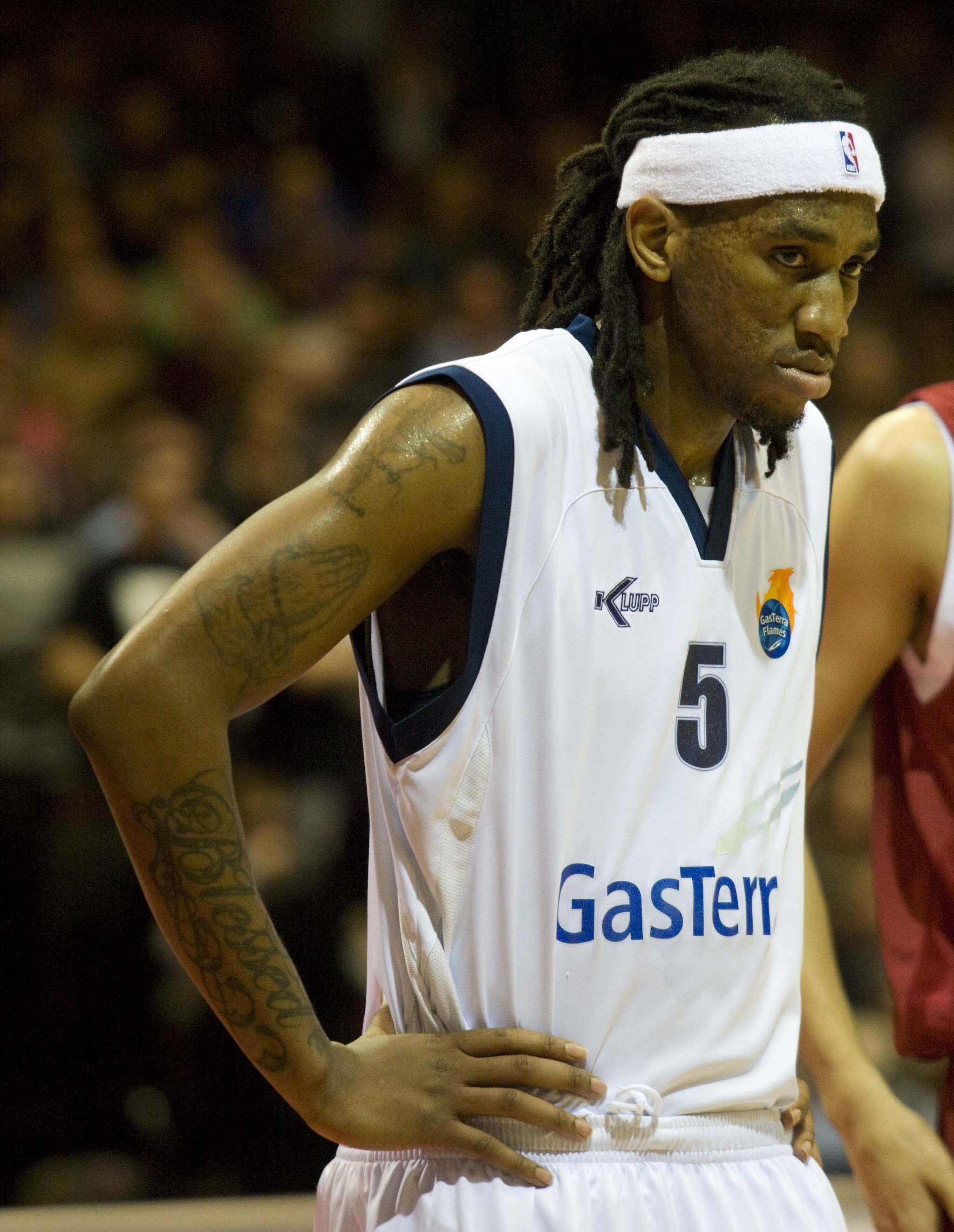 _Q9H0160